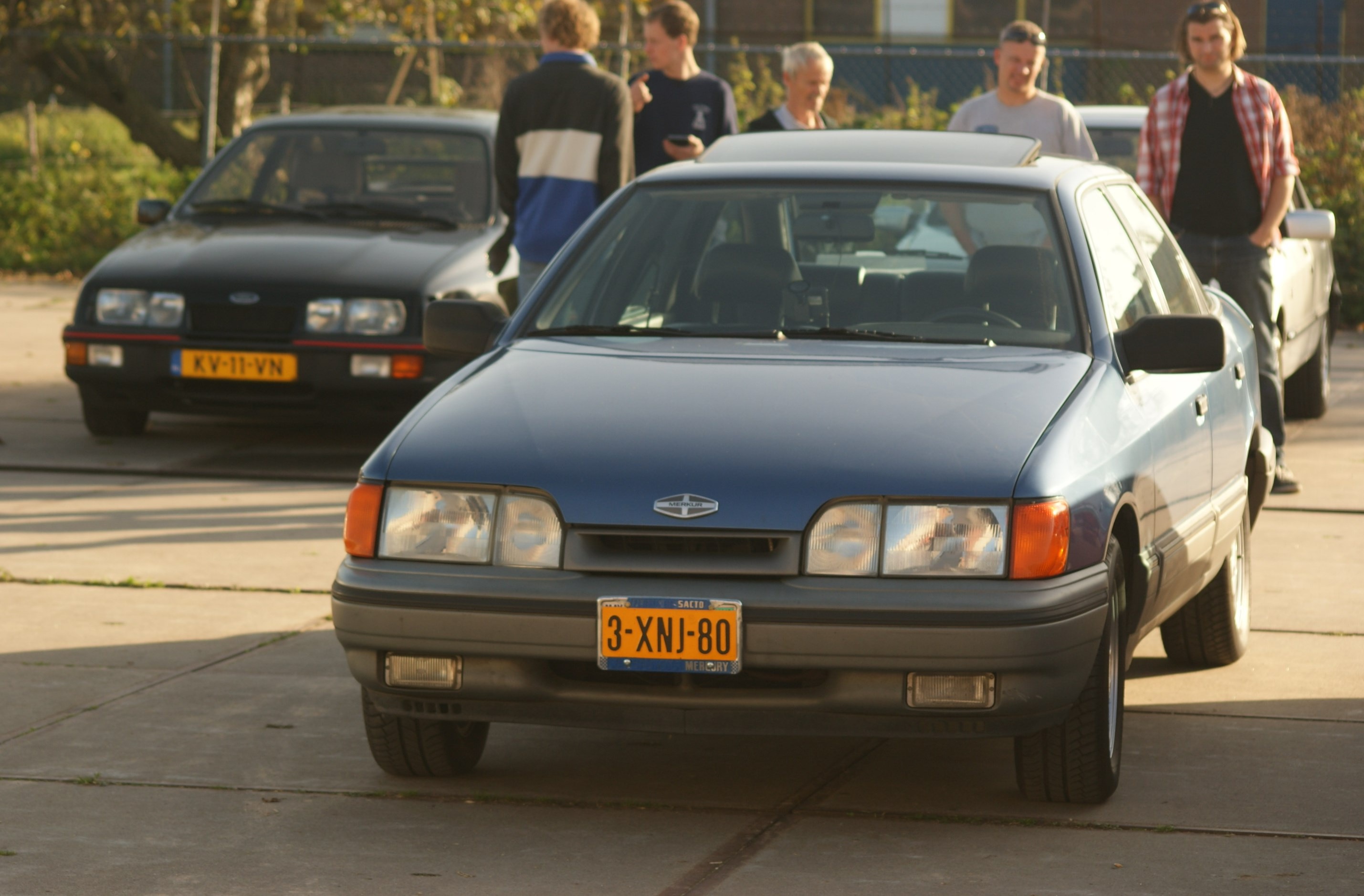 3-XNJ-80 Ford Onderdelendag, Barneveld